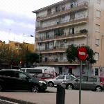 edificio típico del barrio